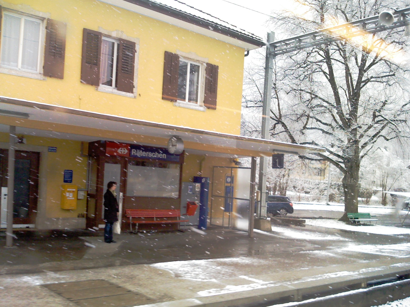 Räterschen station, Canton Zurich, Switzerland - Räterschen stacidomo, Kantono Zuriko, Svislando